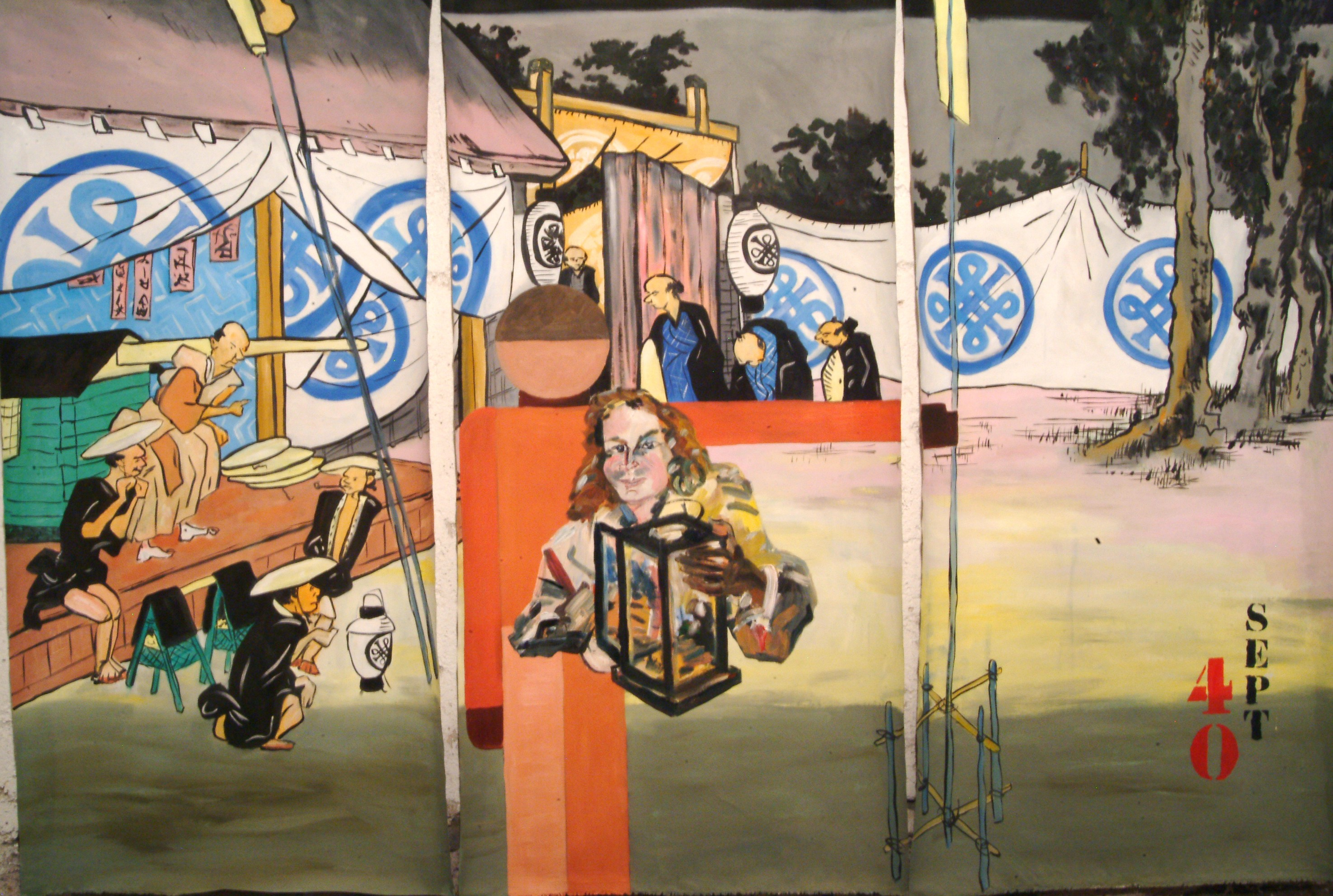 "Seki", 150 x 210 cm, Ölfarbe auf Nessel